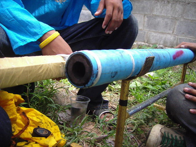 Village Bangfai Noi